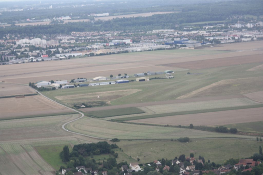 Vue aérienne de l'aérodrome de Chavenay-Villepreux LFPX